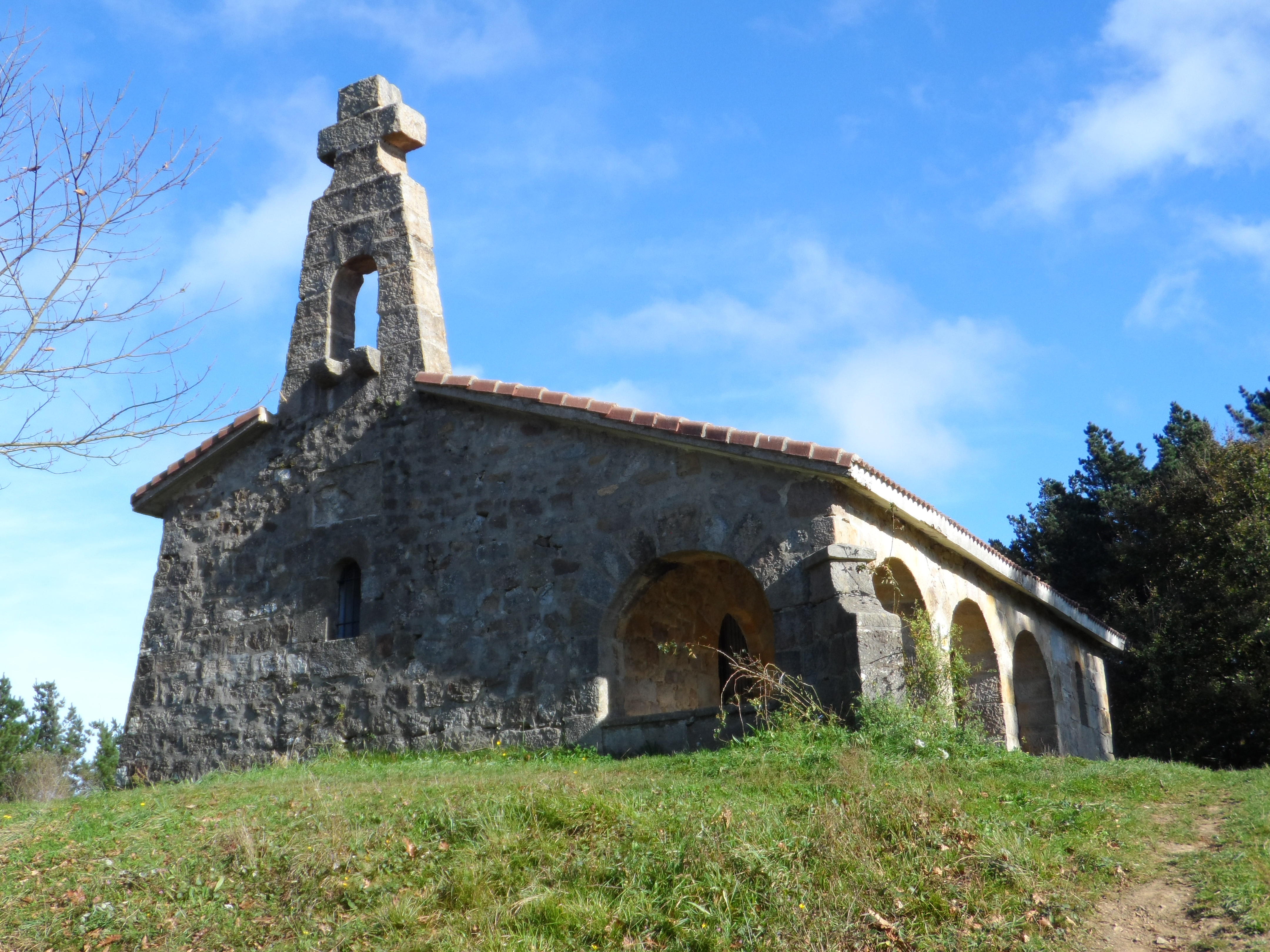 Gurutze Santuari sagaratutako baseliza, Bizkargi mendiaren gailurrean. Bizkaia, Euskal Herria.